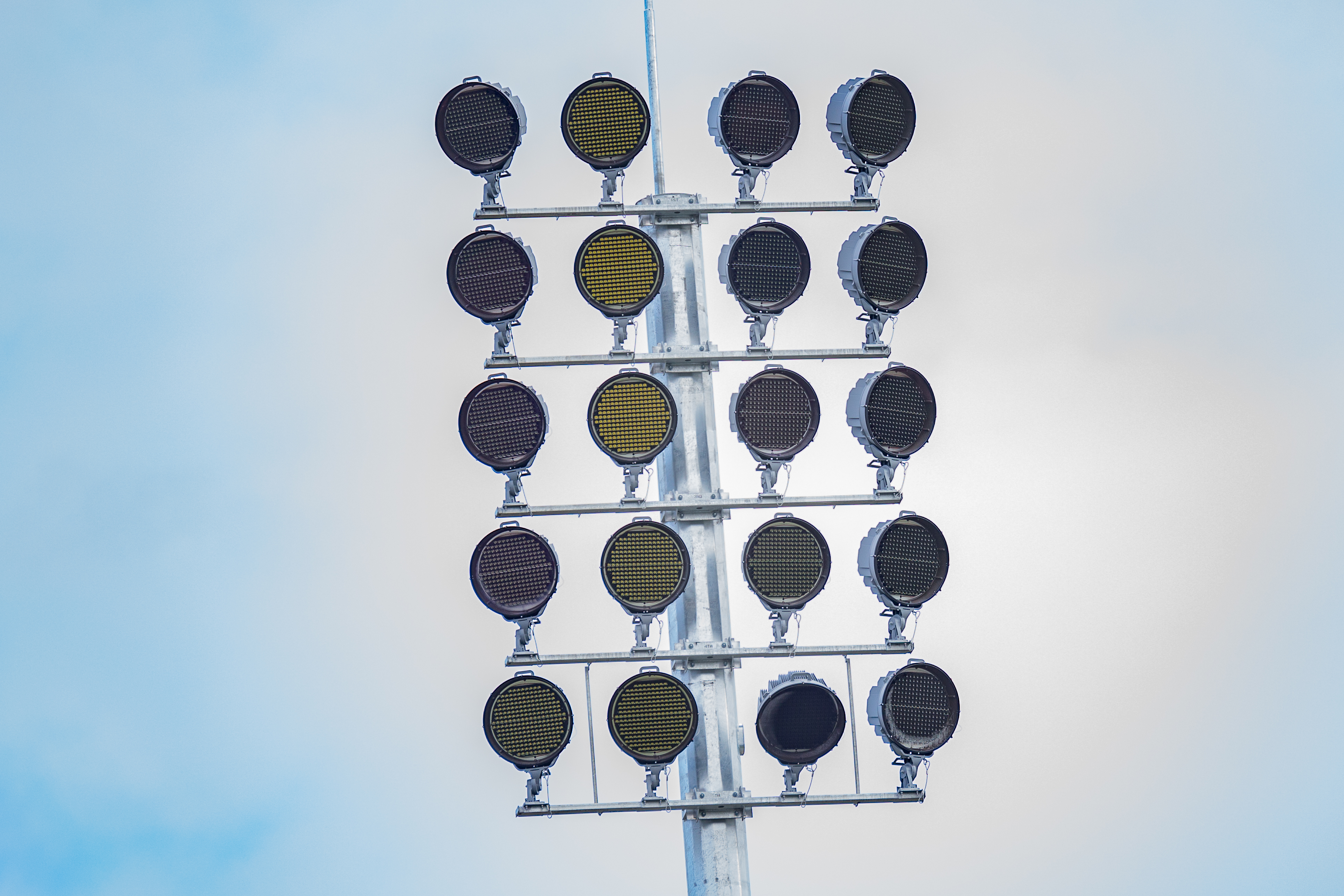 LED-Flutlicht im Ernst-Abbe-Sportfeld in Jena; Symbolbild